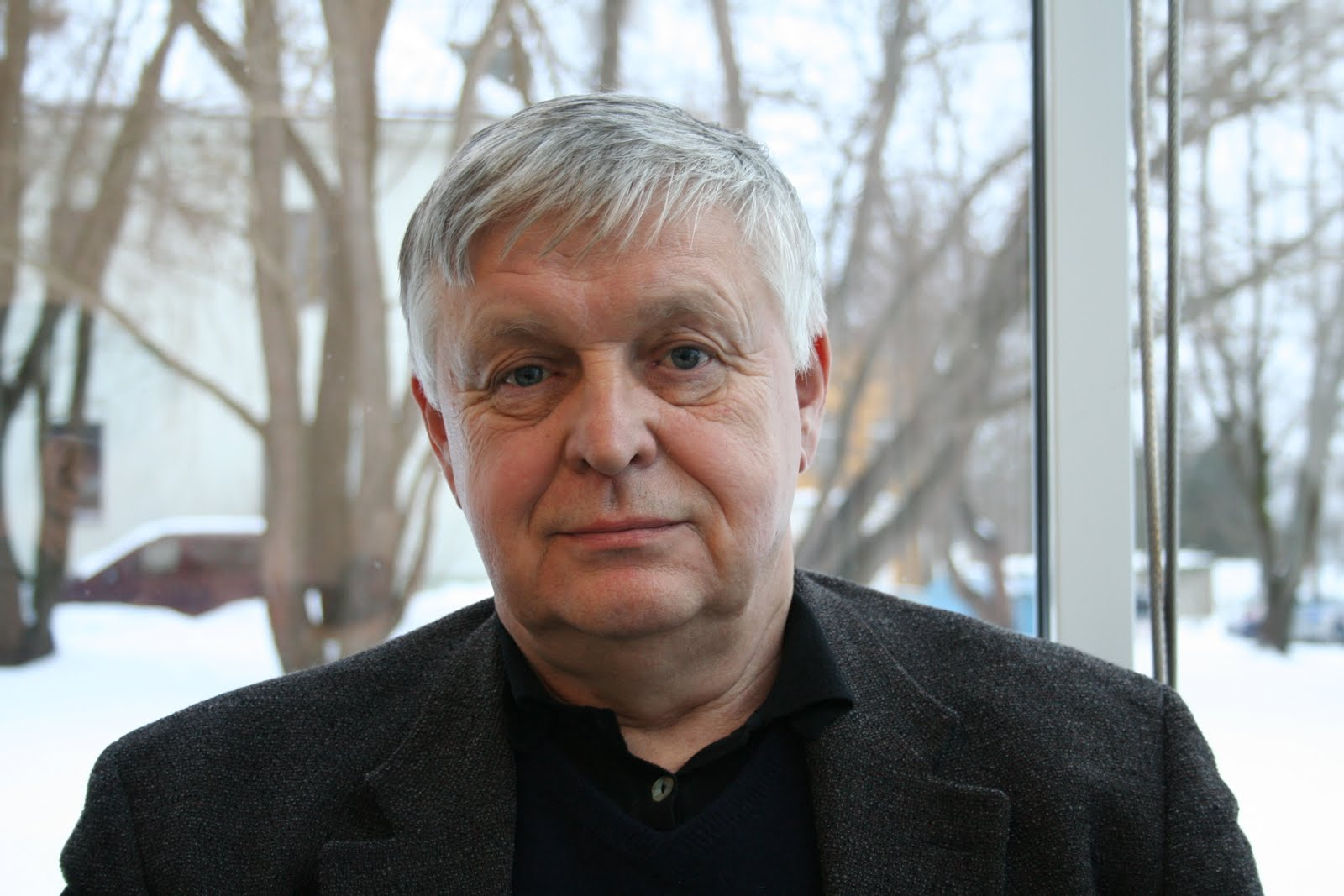 Toomas Vint Kirjanike Liidu korraldatud Kulka kirjanduse sihtkapitali aastaauhinna nominendide tutvustusesinemisel Pärnus.